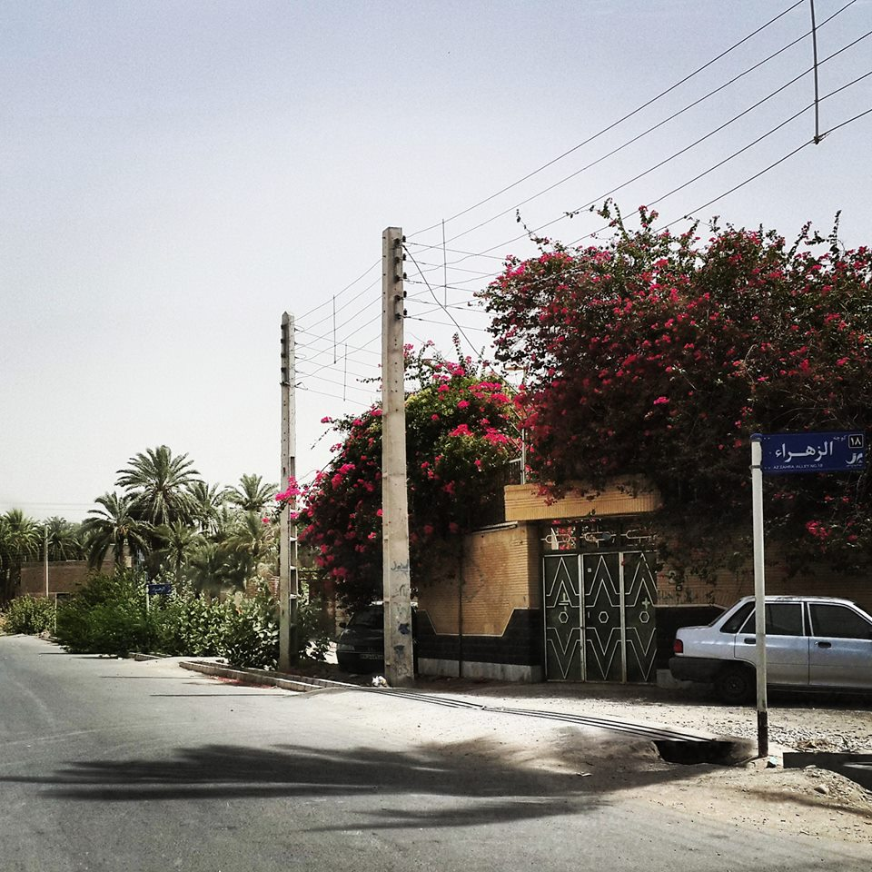 خیابان الزهرا